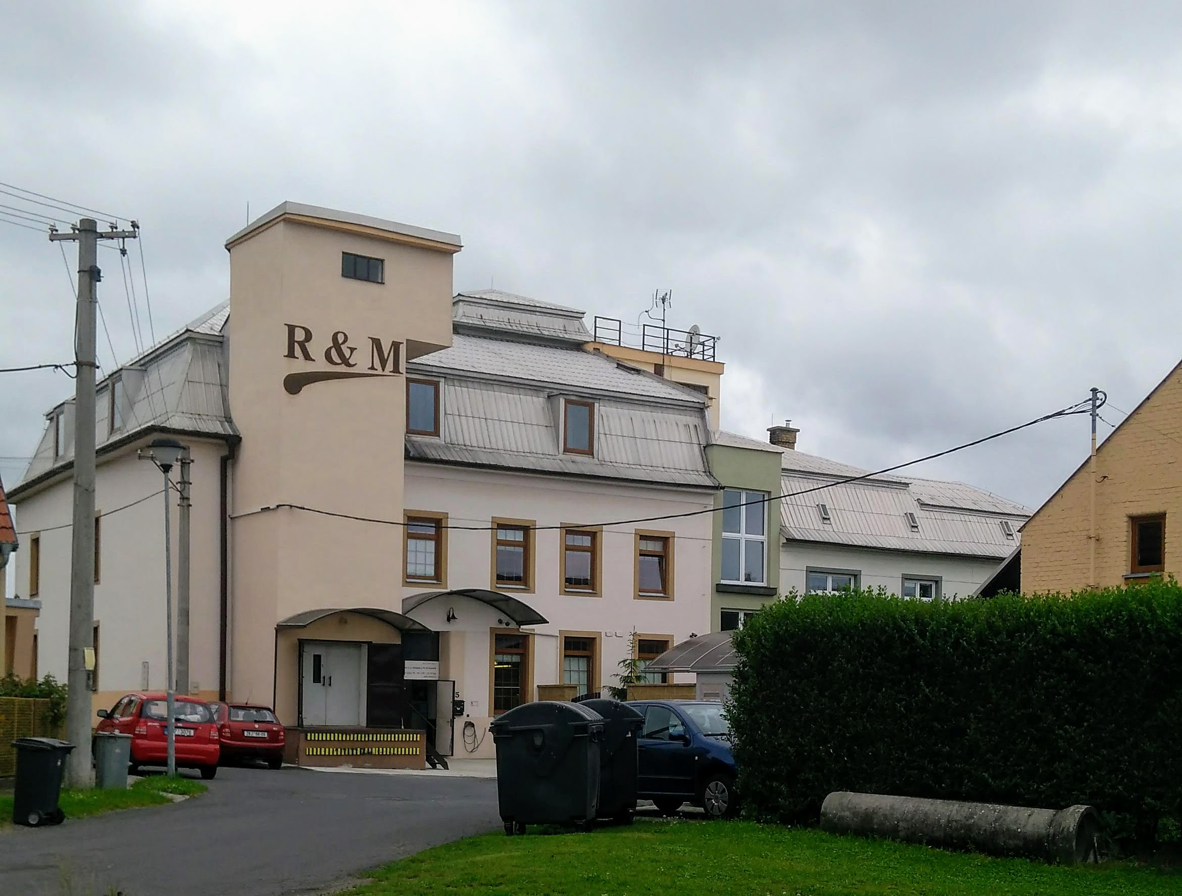 Kroměříž, Kotojedy č.p. 5, bývalý vodní mlýn na Kotojedce